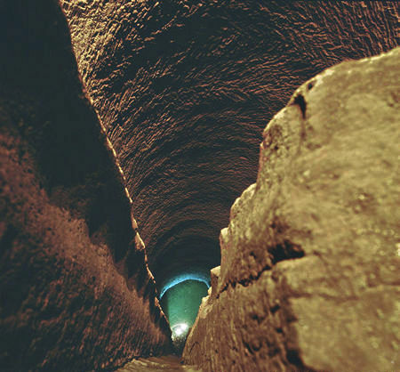 foto dal sito - inserita direttamente dal webmaster